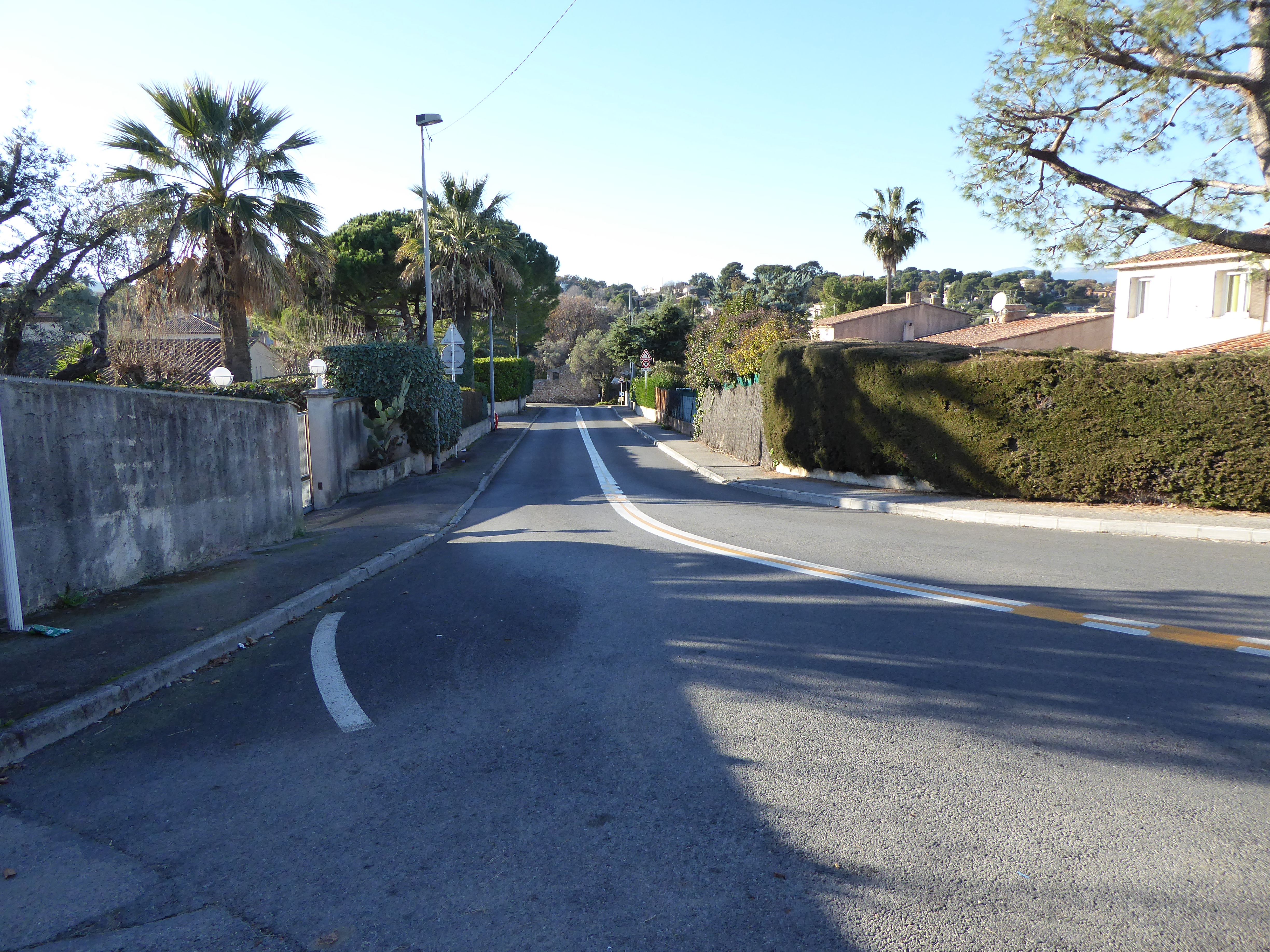 Chemin de la Suquette